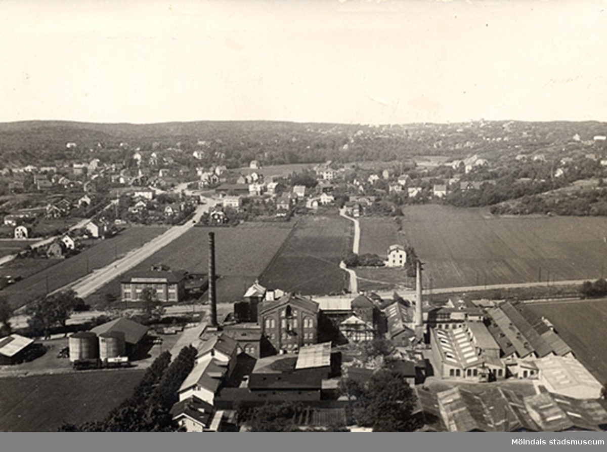 Bilden är från Rallareberget över Göteborgs Jästfabrik (Presenten) i Mölndal och en del av Sörgatan i Krokslätt. Man ser Sörgårdsgatan, Krokslätts parkgata, Torsgatan och Göteborgs vägen, cirka år 1930